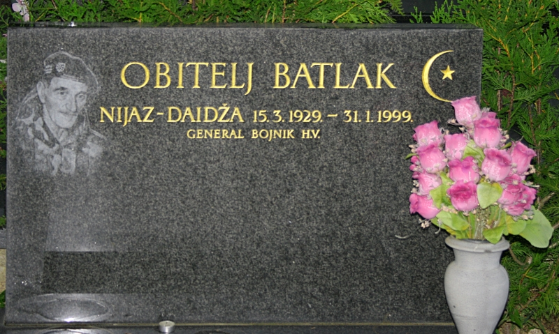 Grob Nijaza Daidže Batlaka na Mirogoju u Zagrebu